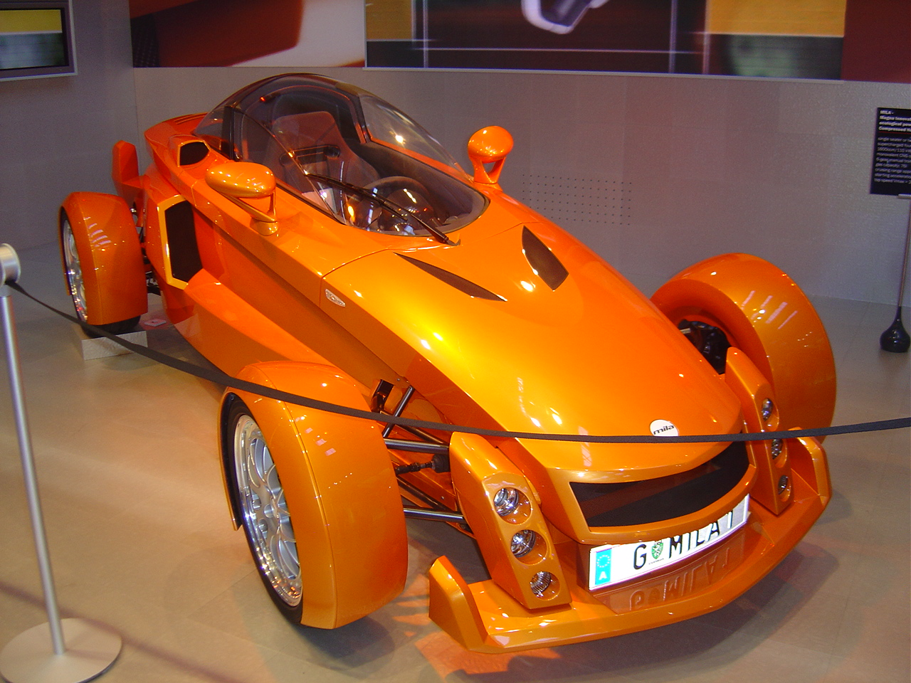 Urheber: Hansdieter Schweiger Datum: 22.09.2005 (Original text: Foto des Sportwagenkonzepts MILA auf der IAA 2005.) Das Bild wurde von mir selbst fotografiert. Ich stimme hiermit zu, das Bild gemeinfrei zu stellen. -- Garbage 18:25, 24. Sep 2005 (CEST)